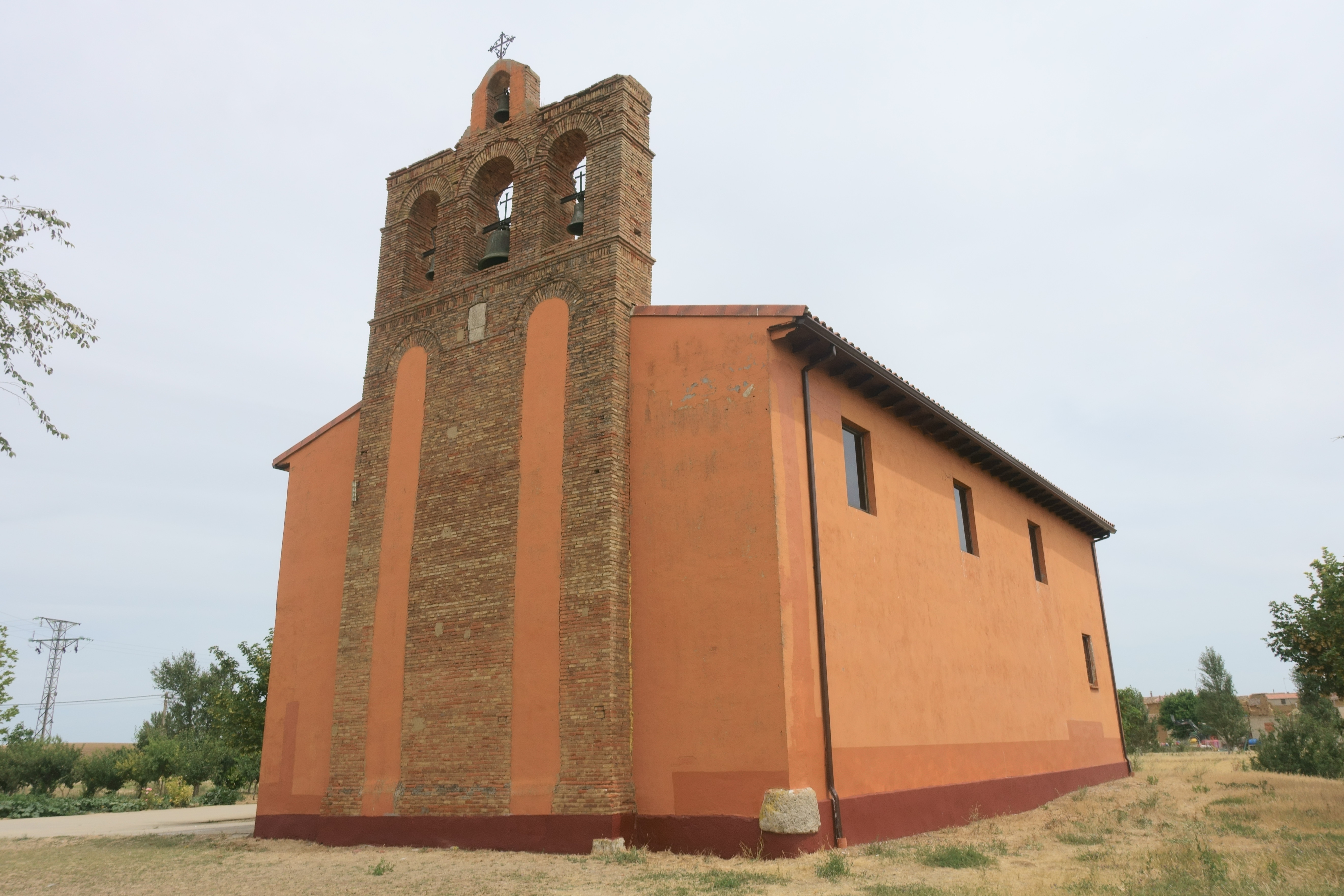 Ermita Virgen de Mediavilla, Abastas (Palencia, España).